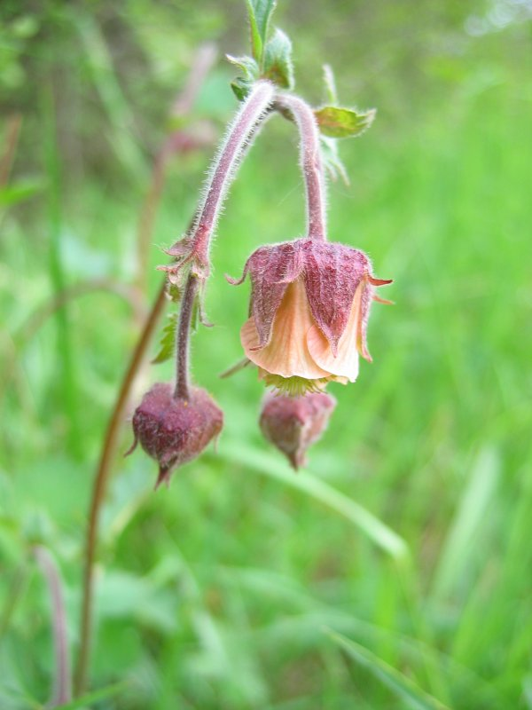 Bach-Nelkenwurz Geum rivale, Rügen